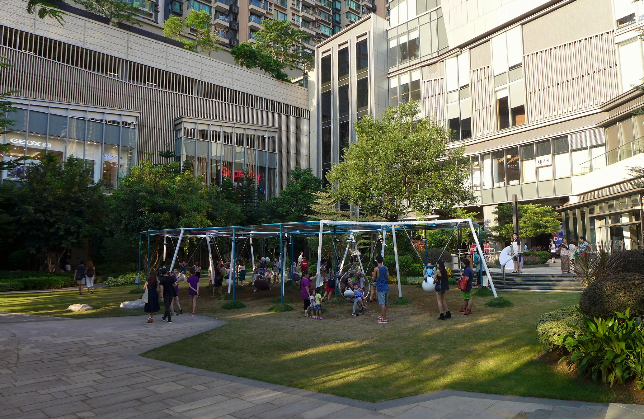 YOHO Mall Midtown Garden